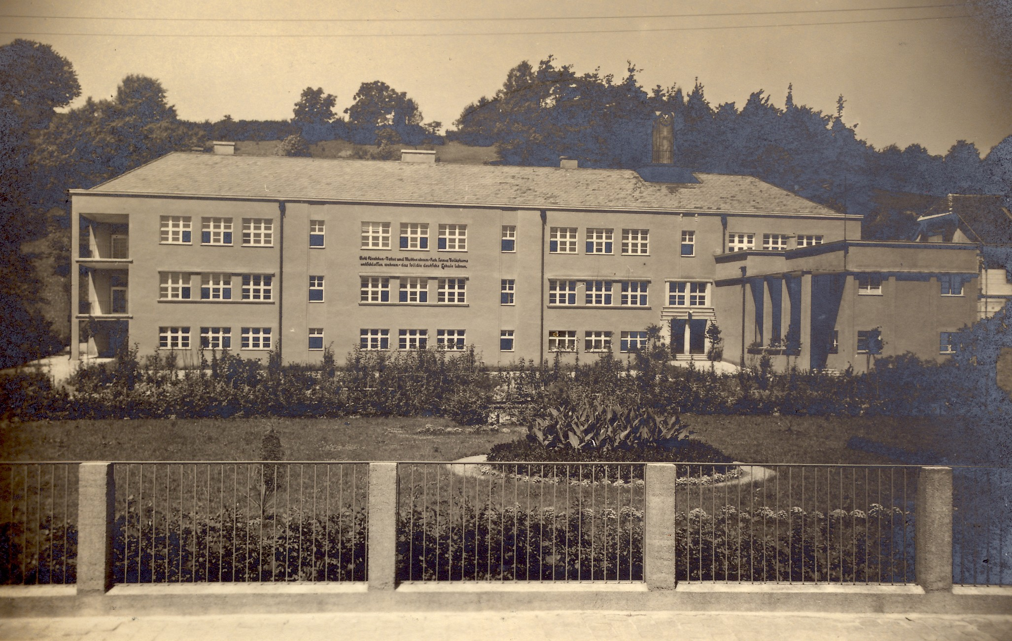 Foto der Hauptschule in Perg 1931